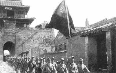 中文（中国大陆）: 1945年5月13日，八路军冀察军区解放涞源城。